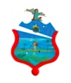 Escudo del Municipio de Frontino